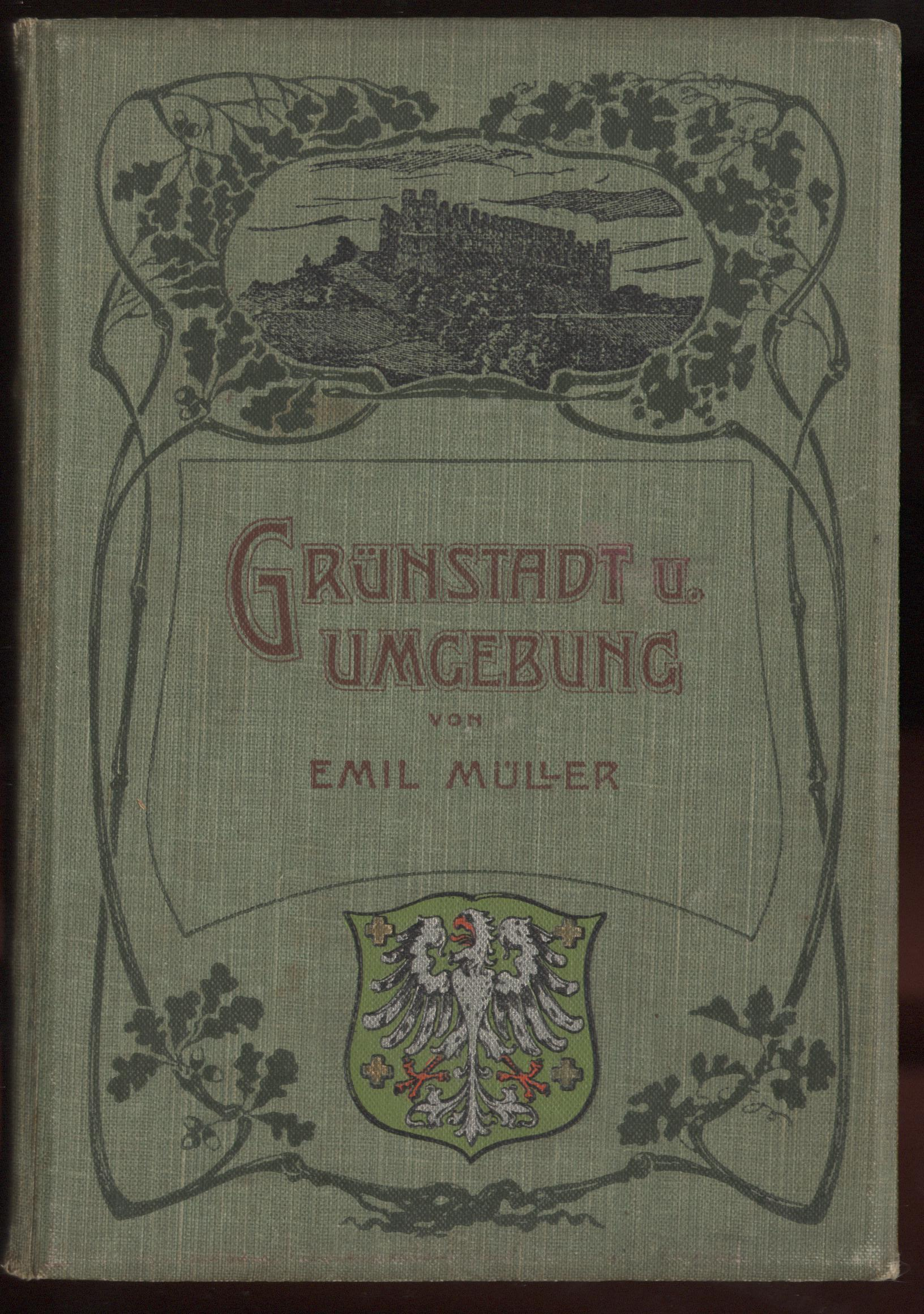 Grünstadt, 1. Buch zur Heimatgeschichte, 1904